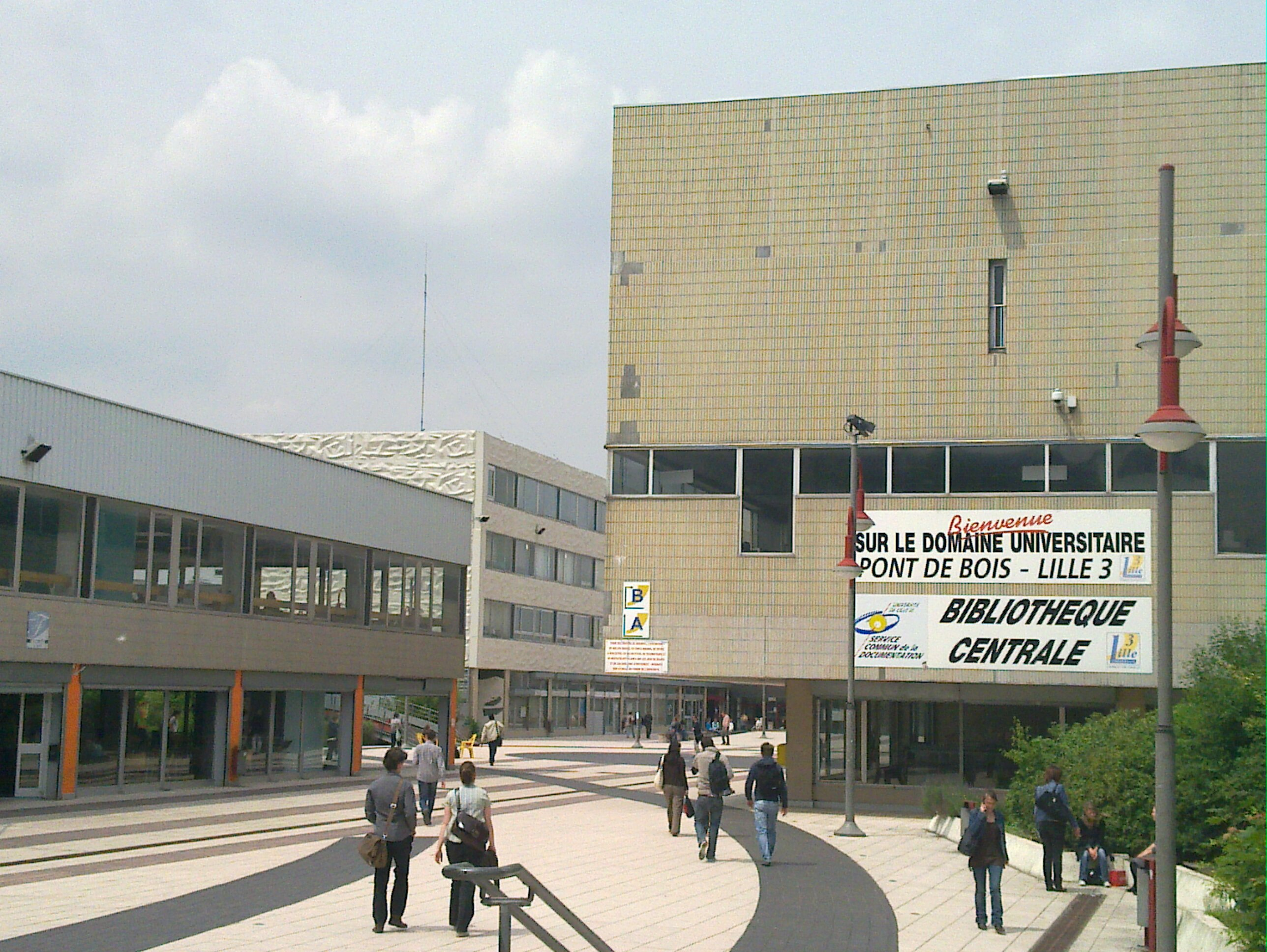 Université Charles-de-Gaulle - Lille 3, Villeneuve d'Ascq